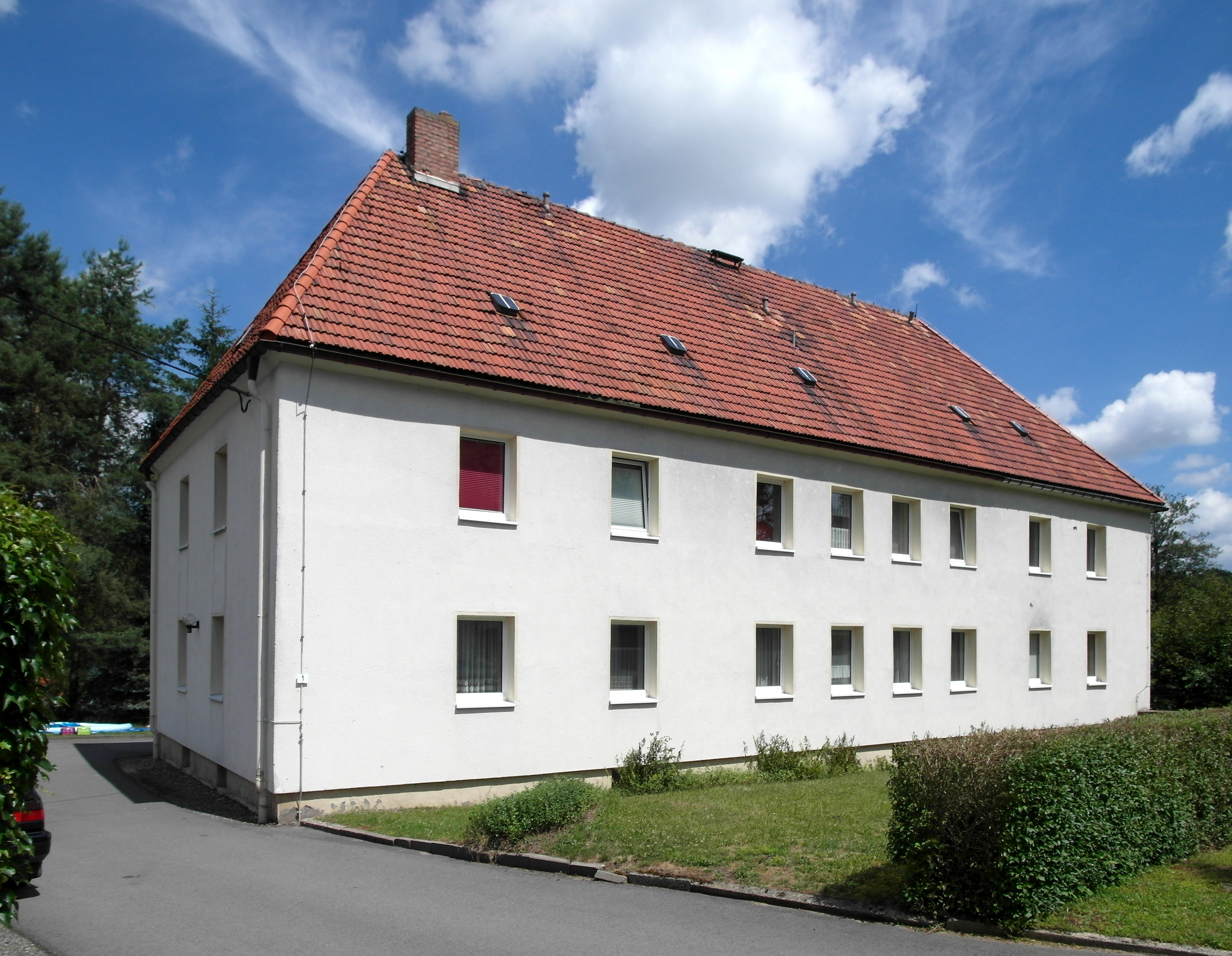 03.07.2017 09600 Oberschöna, Am Geyersberg 1: Hier stand das Schloß vor seinem Abriß (GMP: 50.896371,13.253730). Befestigter Herrensitz seit Mitte des 12. Jh. Feuer zerstörte 1761 (7-jähriger Krieg) Kirche und Rittergut. Neubau durch Hans Georg von Carlowitz 1803/04 nach einem Entwurf des Leipziger Baumeisters Dauthe. 1945 Enteignung und Neuverteilung des Rittergutsbesitzes im Zuge der Bodenreform. Das Herrenhaus diente zunächst als Wohnhaus, Schule u. Einkaufsmöglichkeit. 1949 erfolgte der Abbruch. Neubau eines Gebäudes mit 6 Wohnungen auf den Grundmaueren des Schlosses. [SAM0788.JPG]20170703225DR.JPG/Repro Blobelt